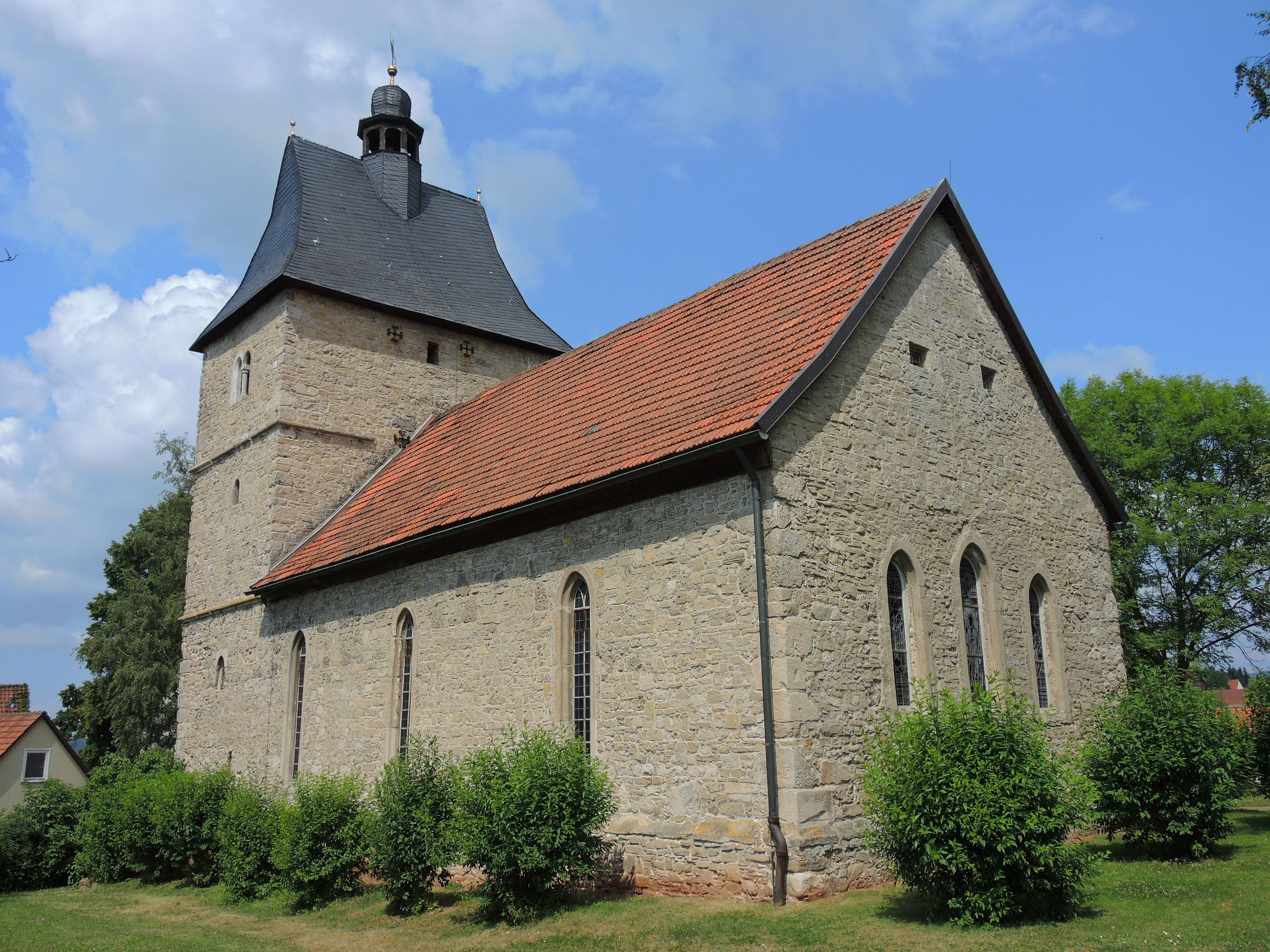 Evangelische St.-Andreas-Kirche in Tettenborn bei Bad Sachsa